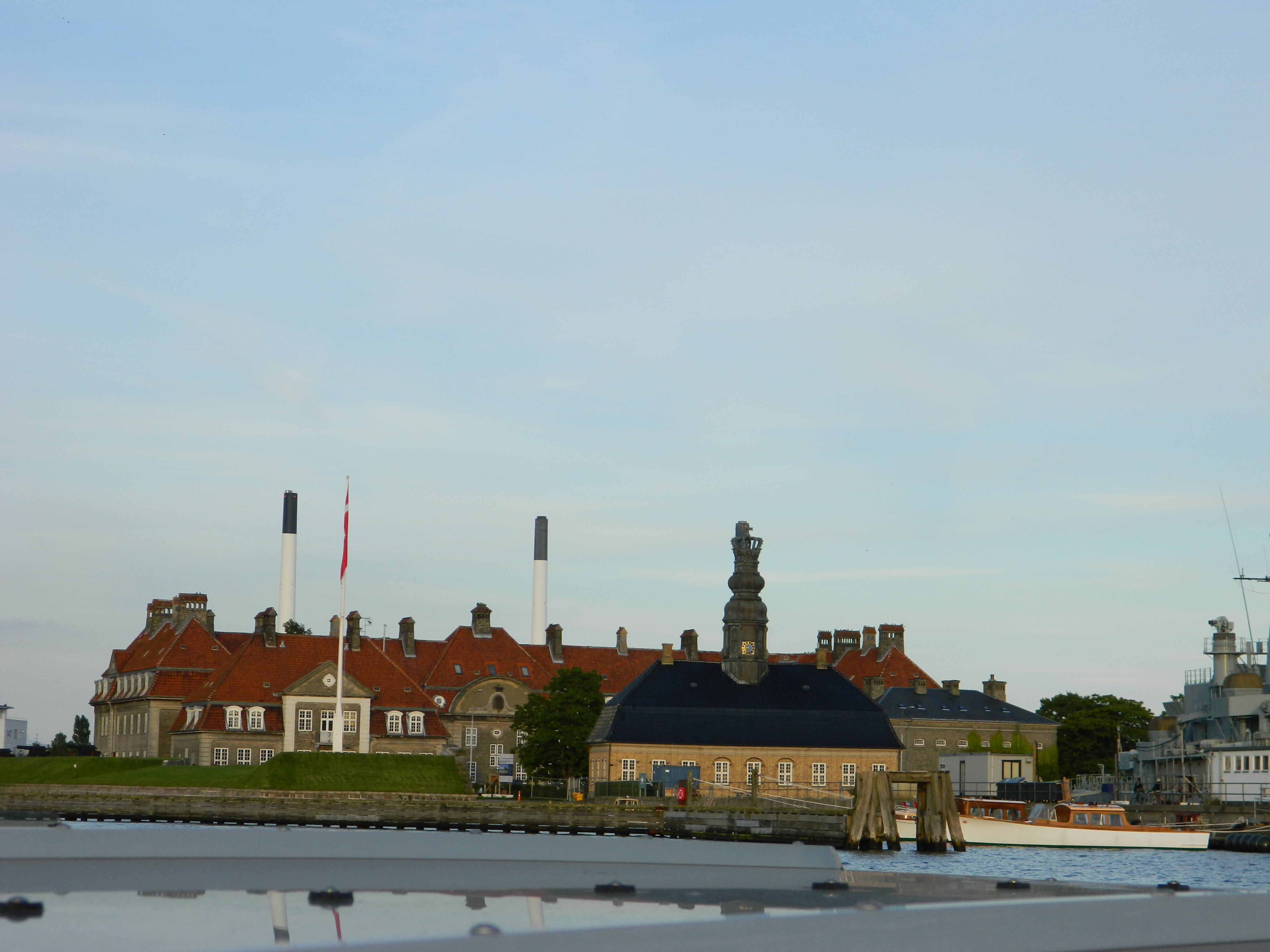 Copenhagen